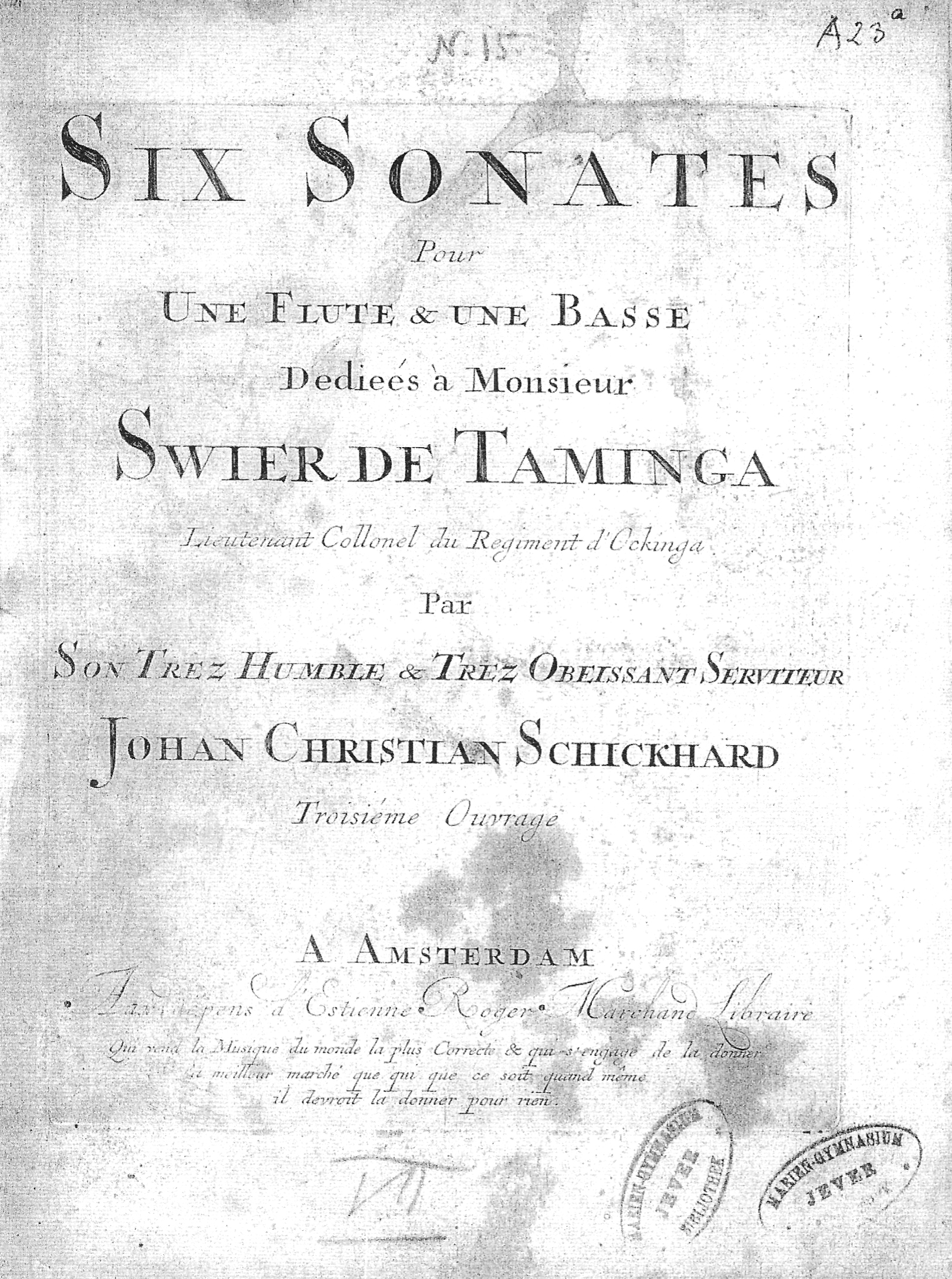 Titelseite zu Sechs Sonaten für Flöte und Basso continuo op. 3 von Johann Christian Schickhardt, erschienen in Amsterdam, mit der Widmung an Swier da Taminga